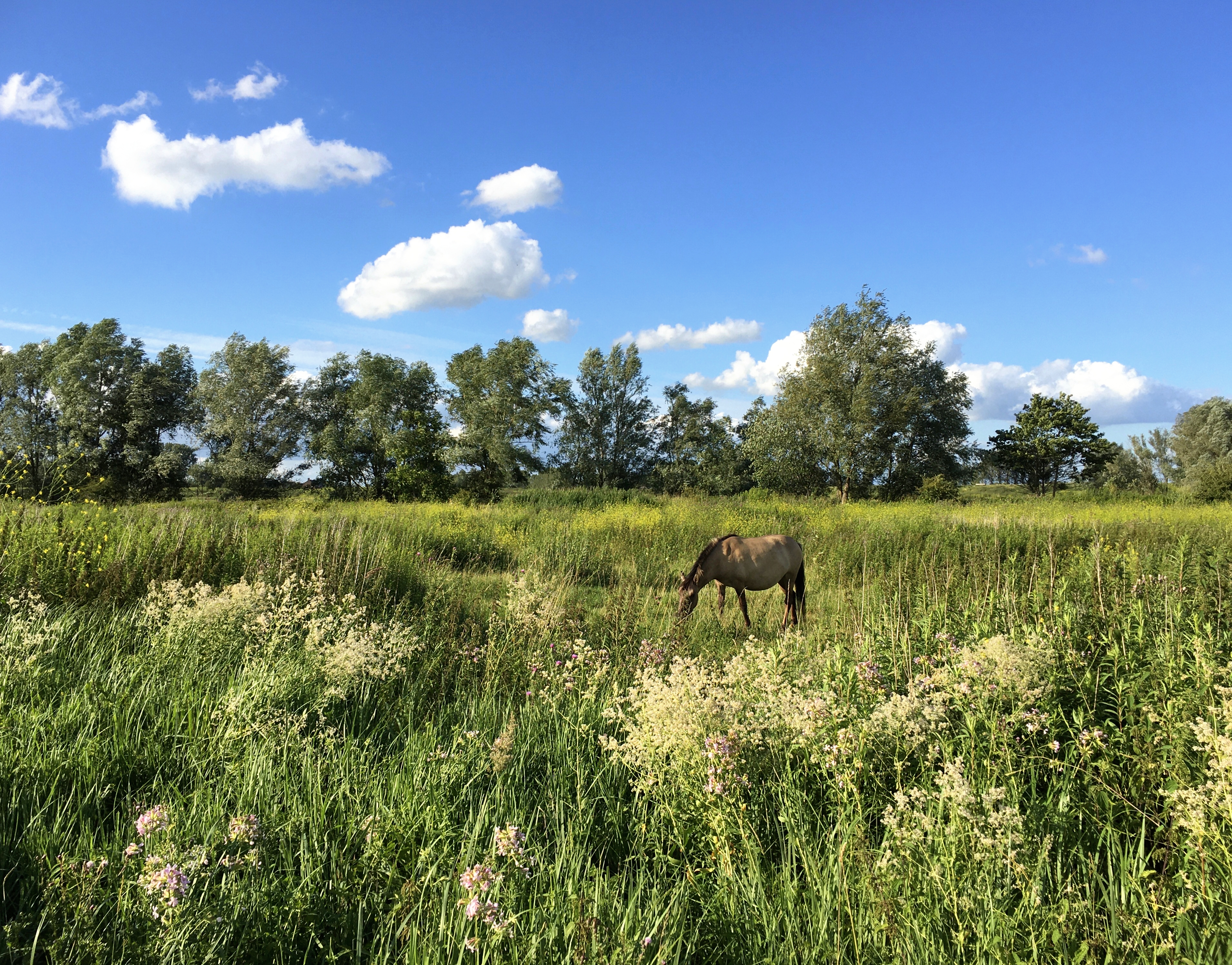 The landscape of the Klompenwaard (Doornenburg, Lingewaard)